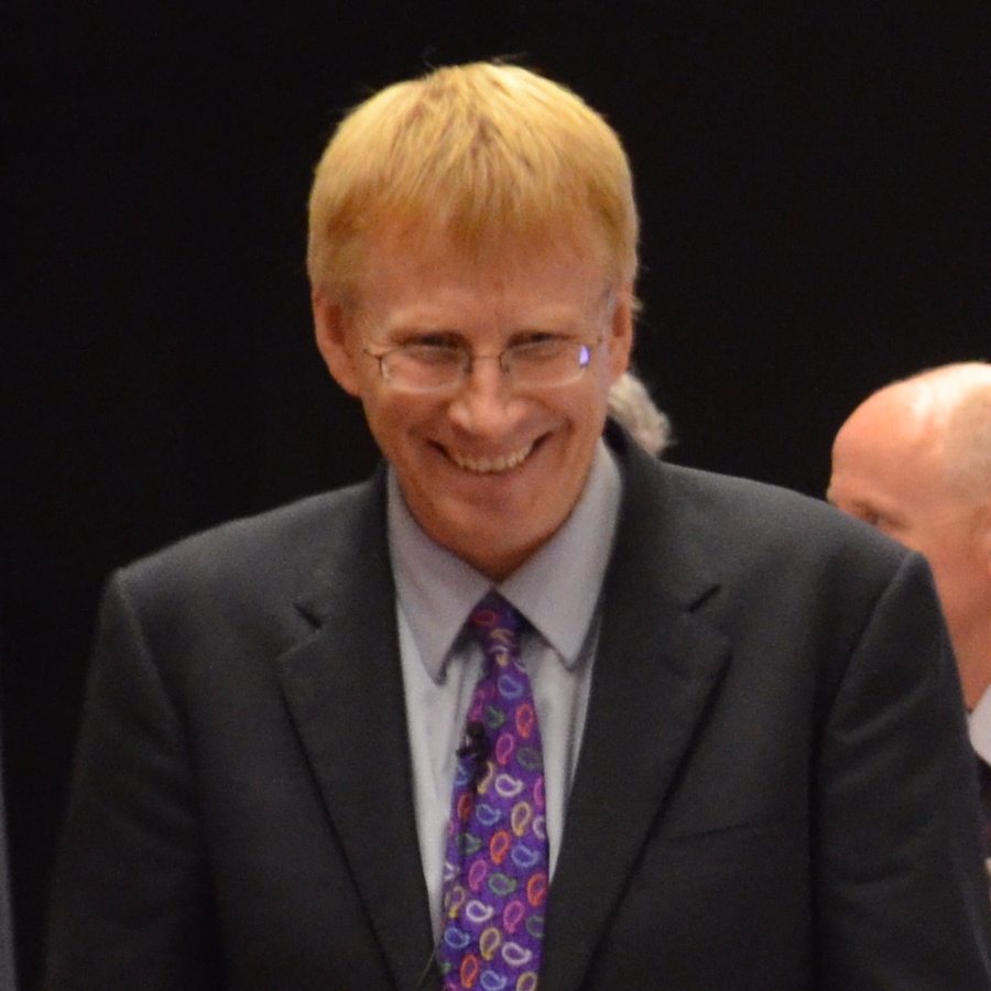 Dr Phil Hammond